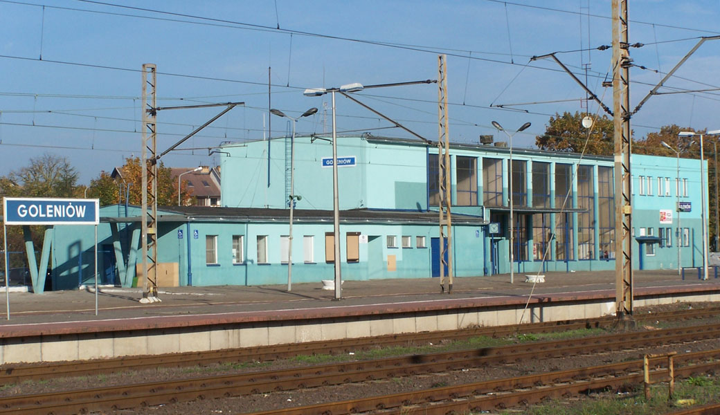 Dworzec PKP w Goleniowie